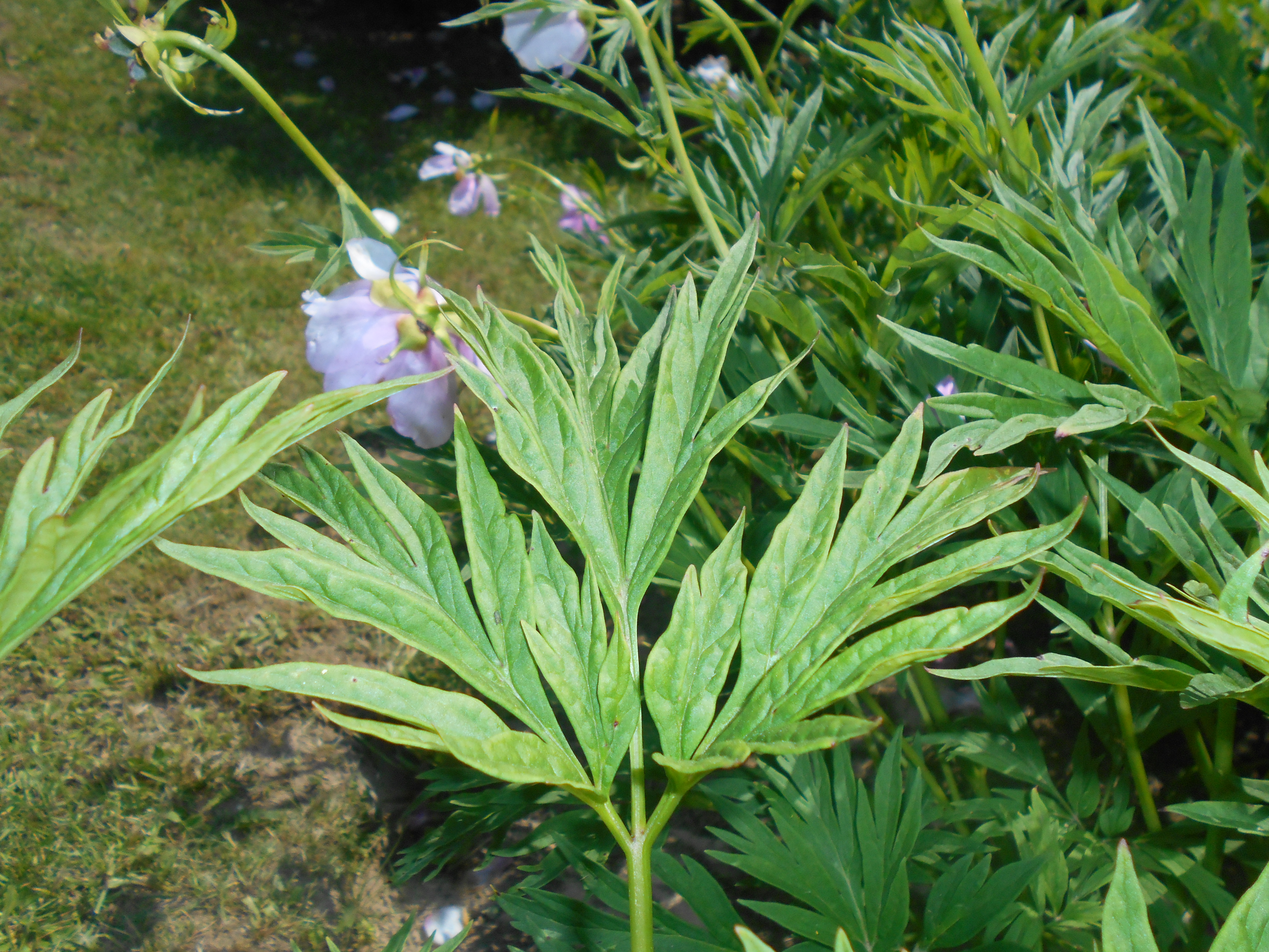 Piwonia odmienna (Paeonia anomala), Ogród Botaniczny UMCS w Lublinie.